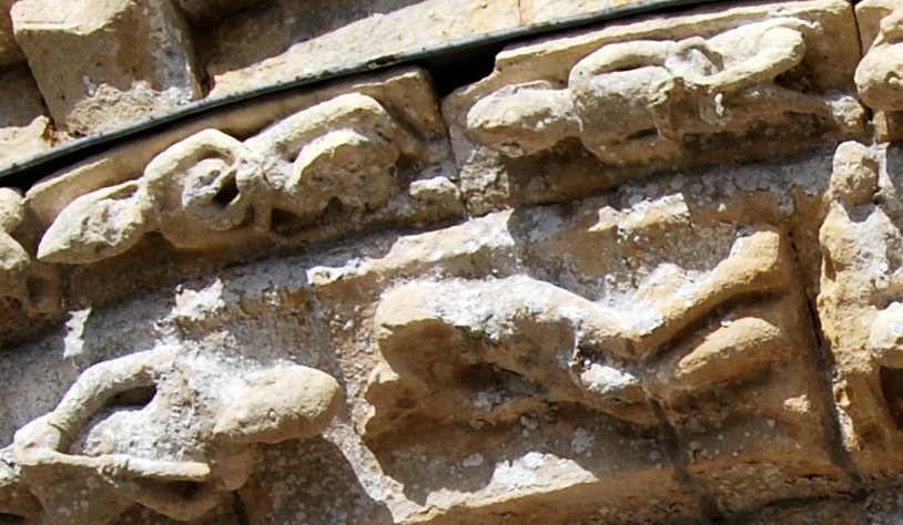 Détails du Zodiaque du Portail